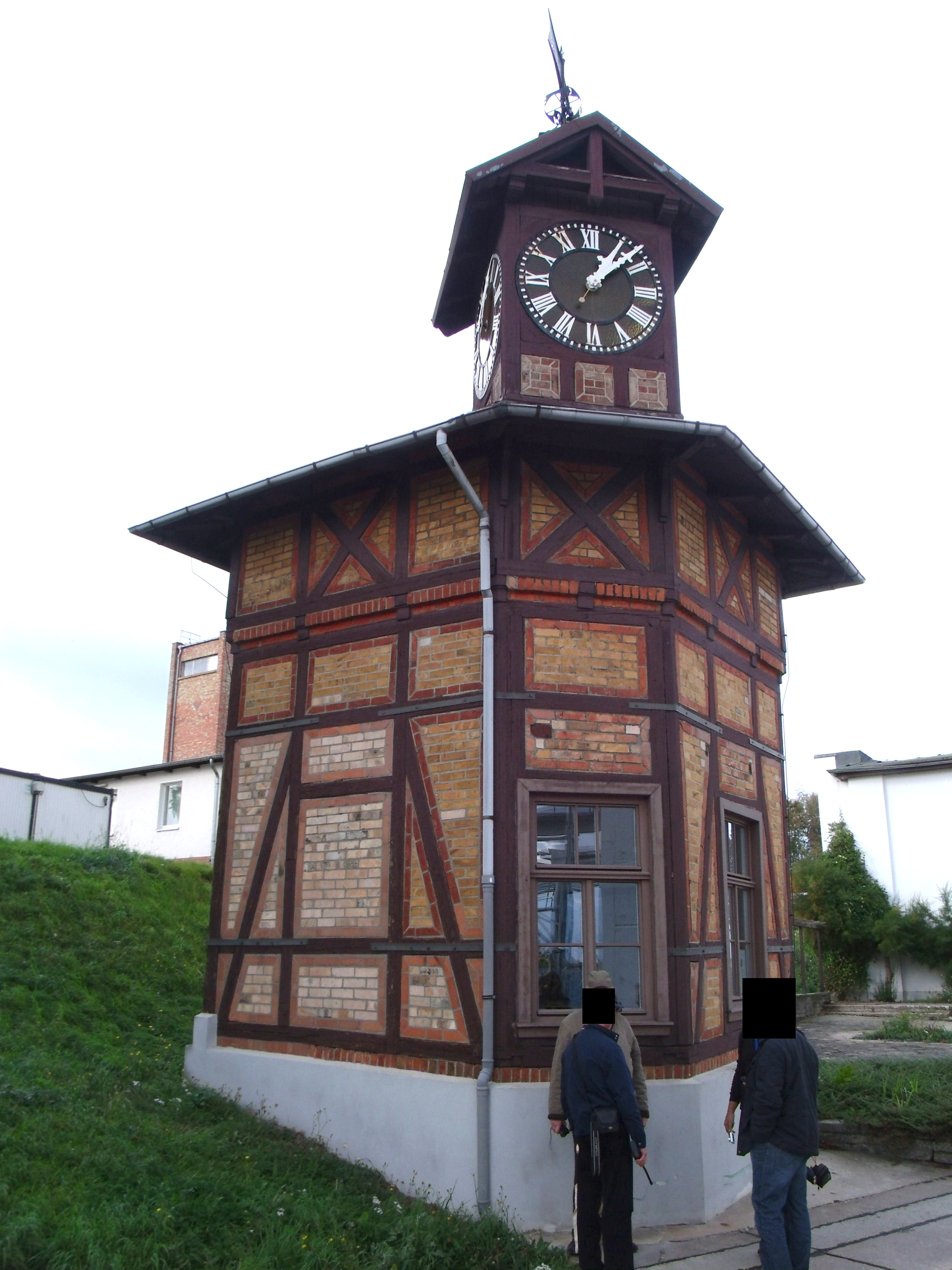 Pförtnerhäuschen ehemaliges Kaliwerk Bartensleben